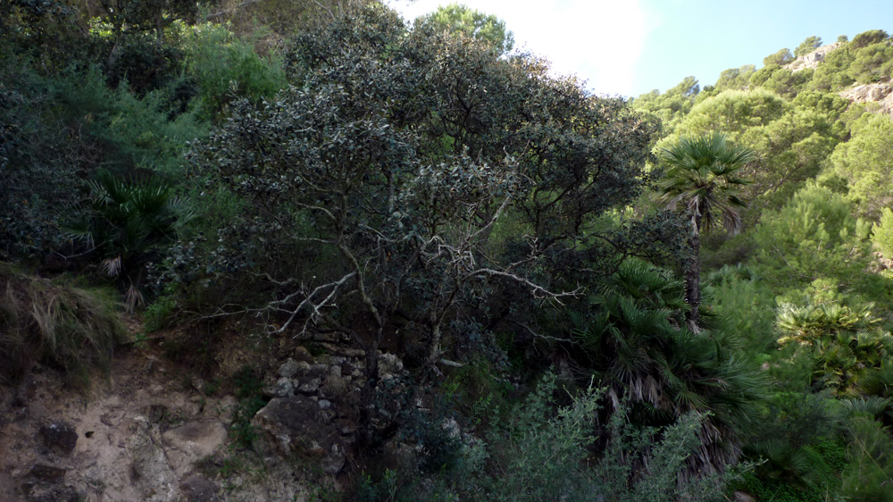 Encinas, pinos y palmitos en el Cabezo del Horno en Calblanque, Cartagena, España.